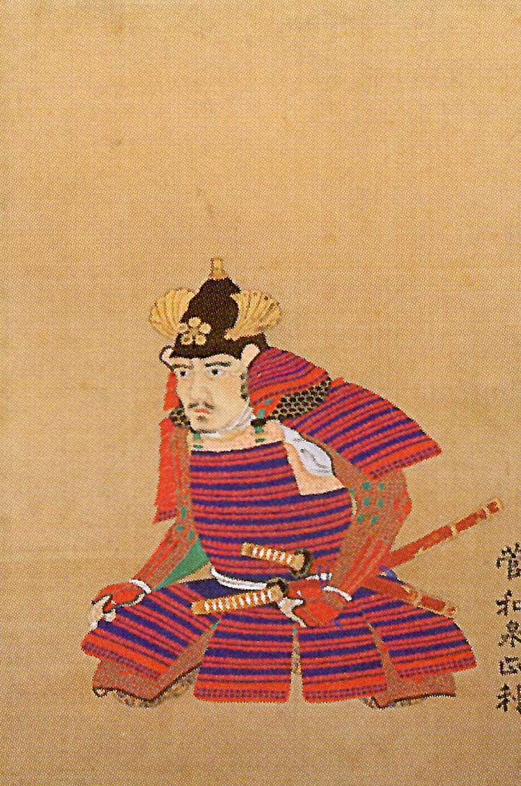 菅正利の肖像。